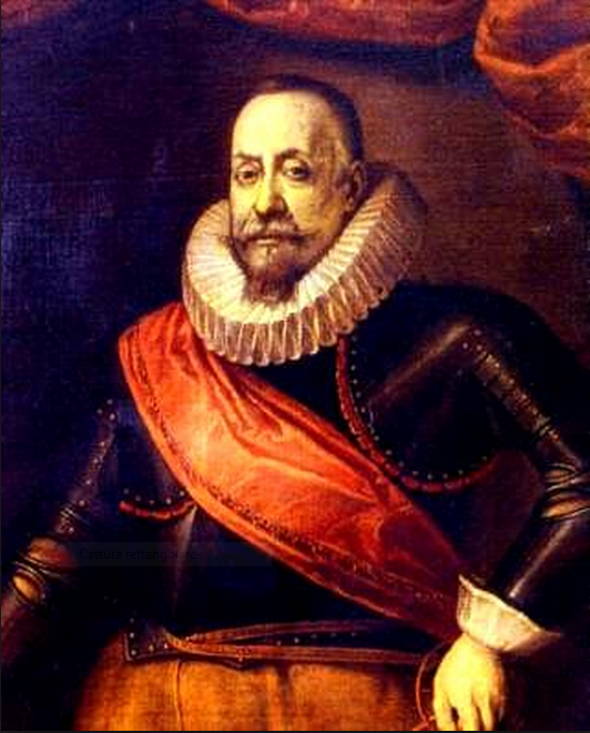 Portrait of Prince Pedro Alvarez de Toledo y Colonna